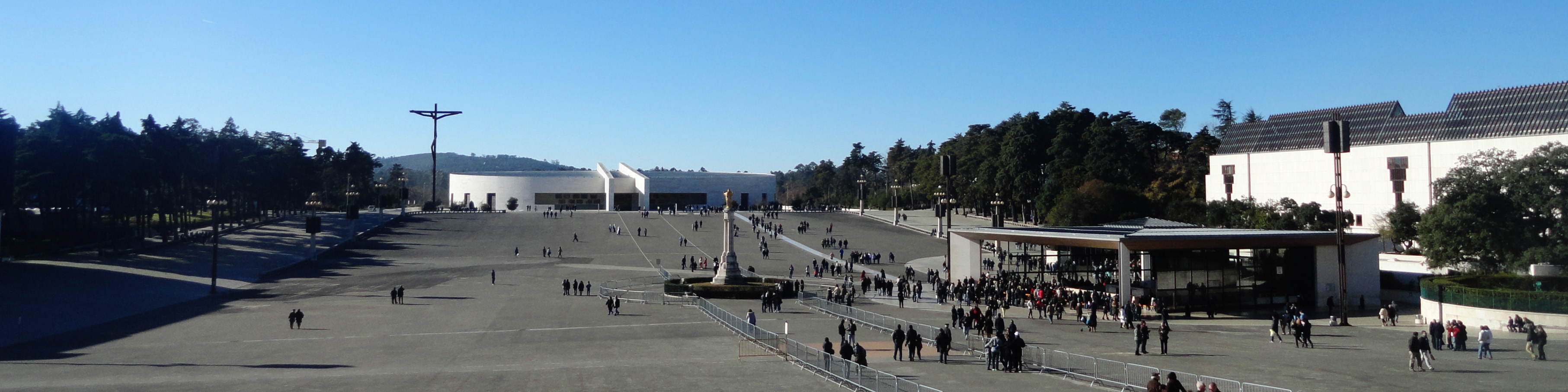 Santuário de Fátima